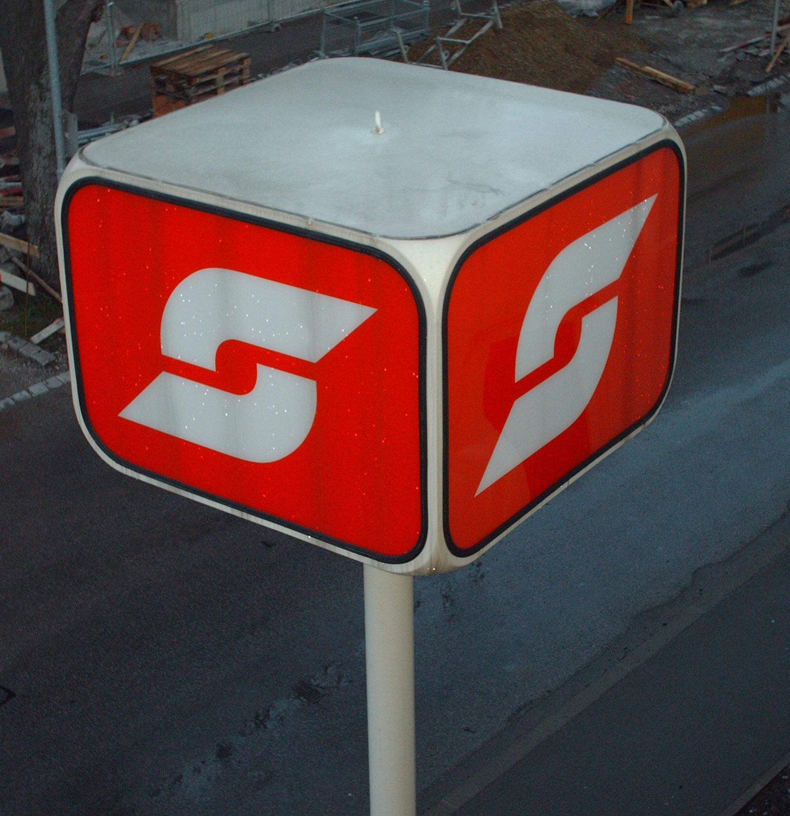 ÖBB Logo